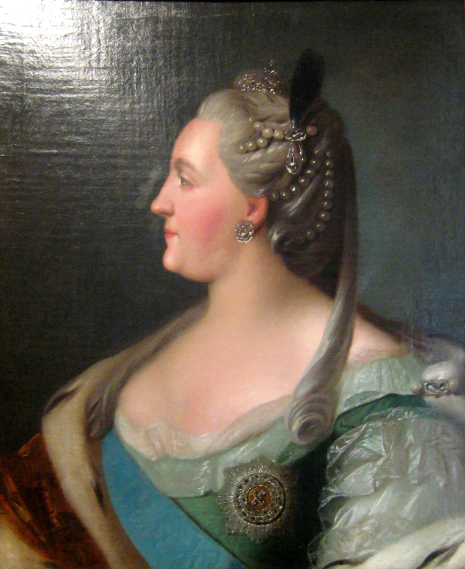 Профильный портрет Екатерины II. Музей Тропинина